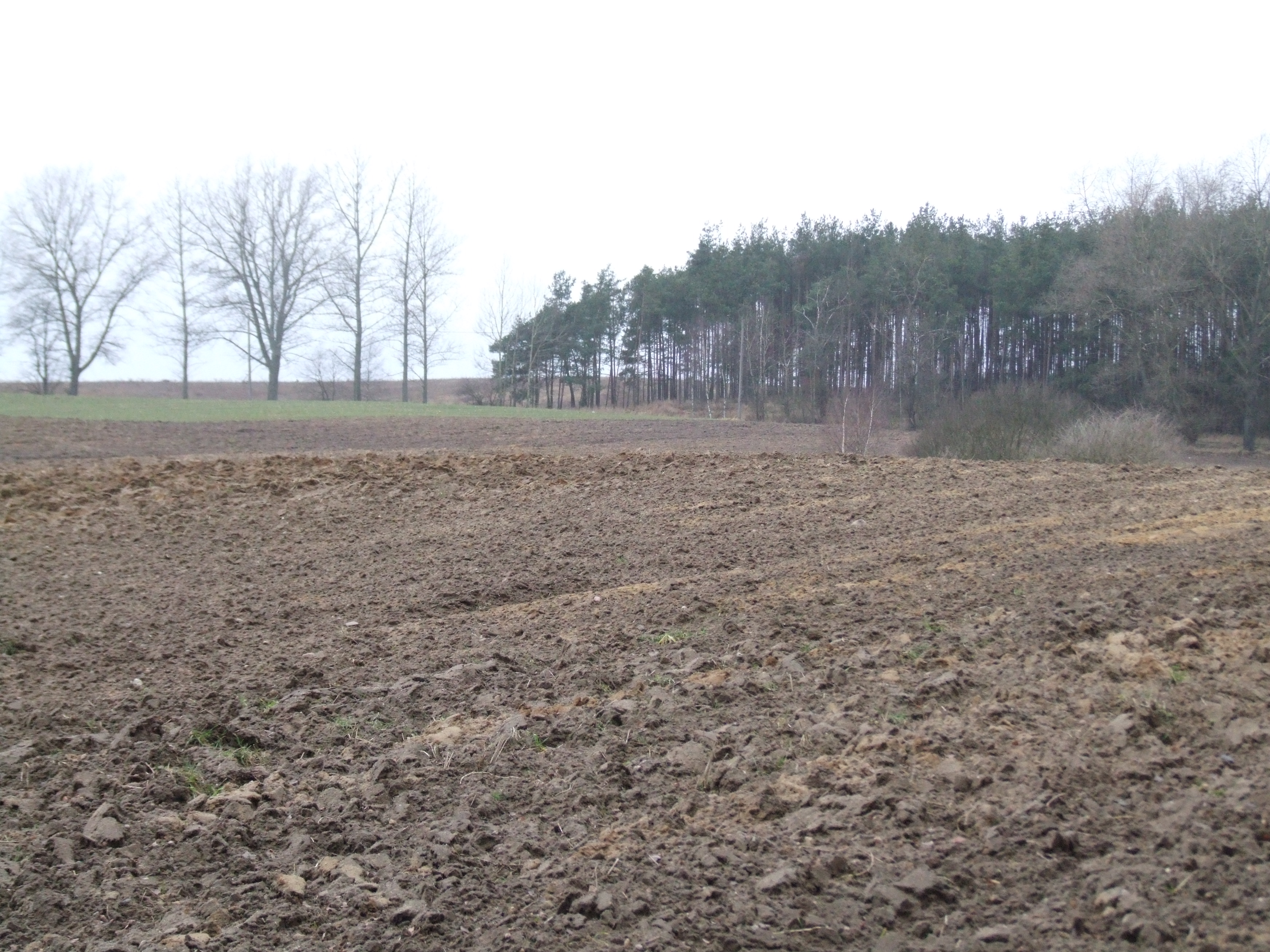 Malary